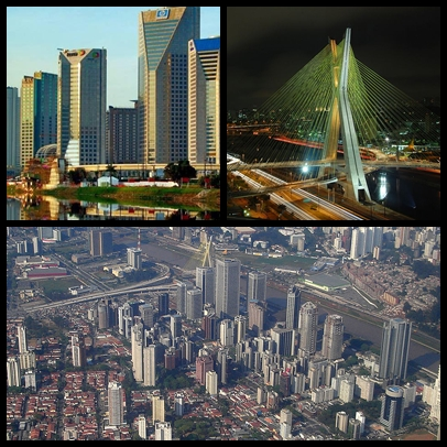 Montagem de fotos do bairro do Brooklin, São Paulo, Brasil